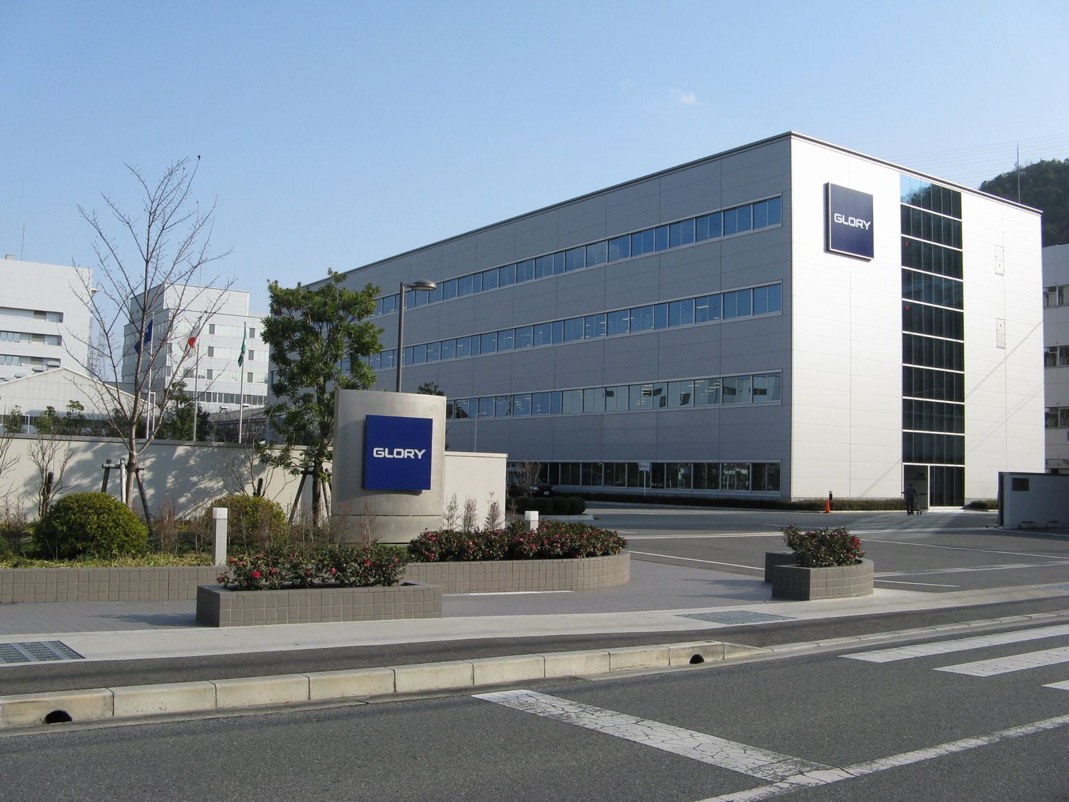 グローリー株式会社 本社